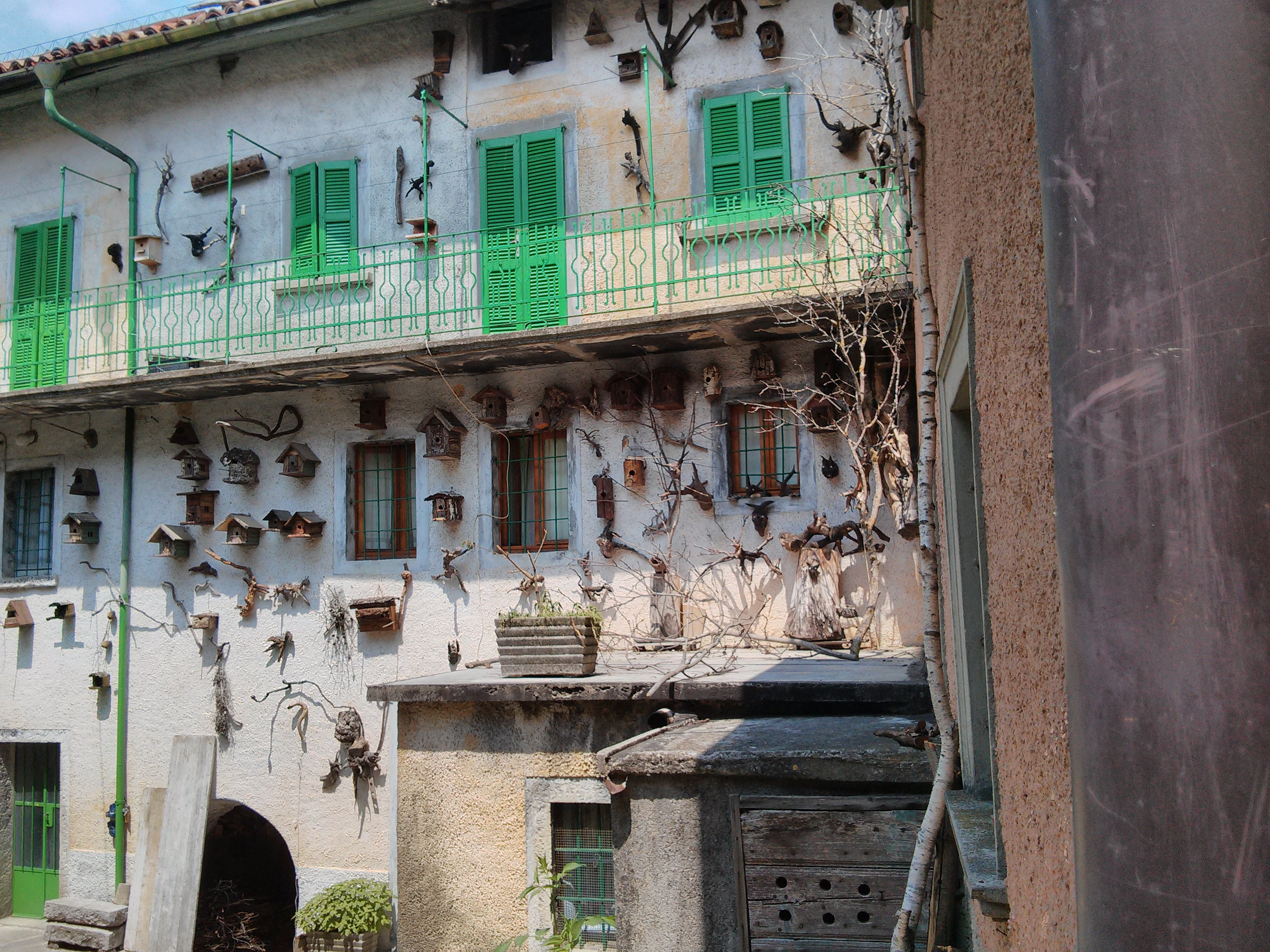 colle di sogno carenno - scorcio del paese